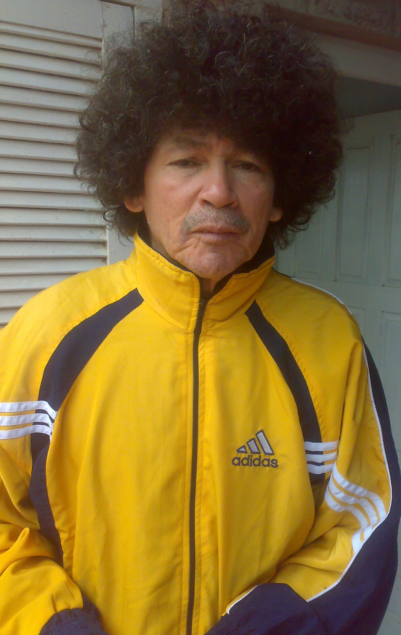 Cristino Centurión en su faceta como DT.